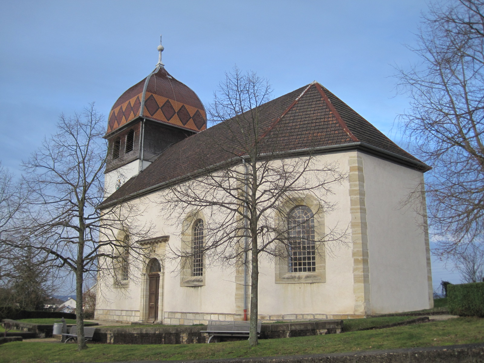 Église d'Étupes